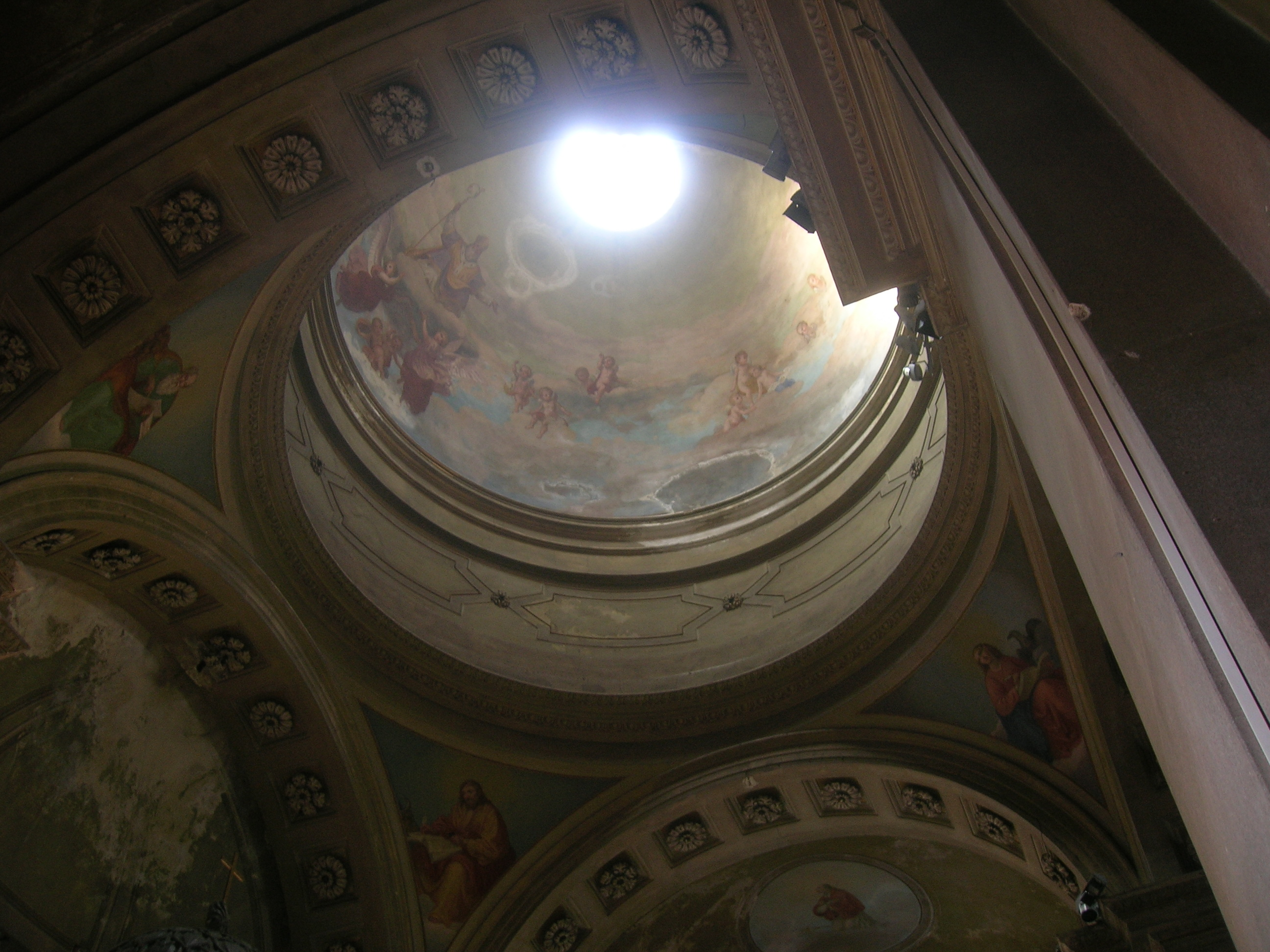 Interni del santuario di San Martino in Balsamo (Cinisello Balsamo). La cupola.